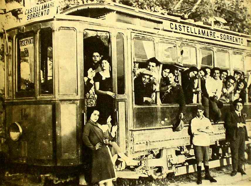 Il tram Castellammare di Stabia-Sorrento